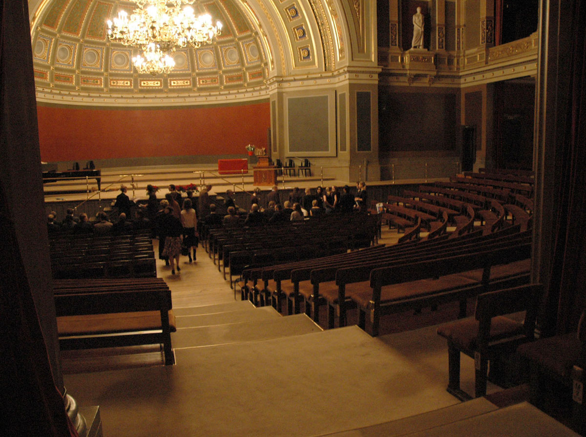 Självtagen bild föreställande aulan i universitetshuset i Uppsala.